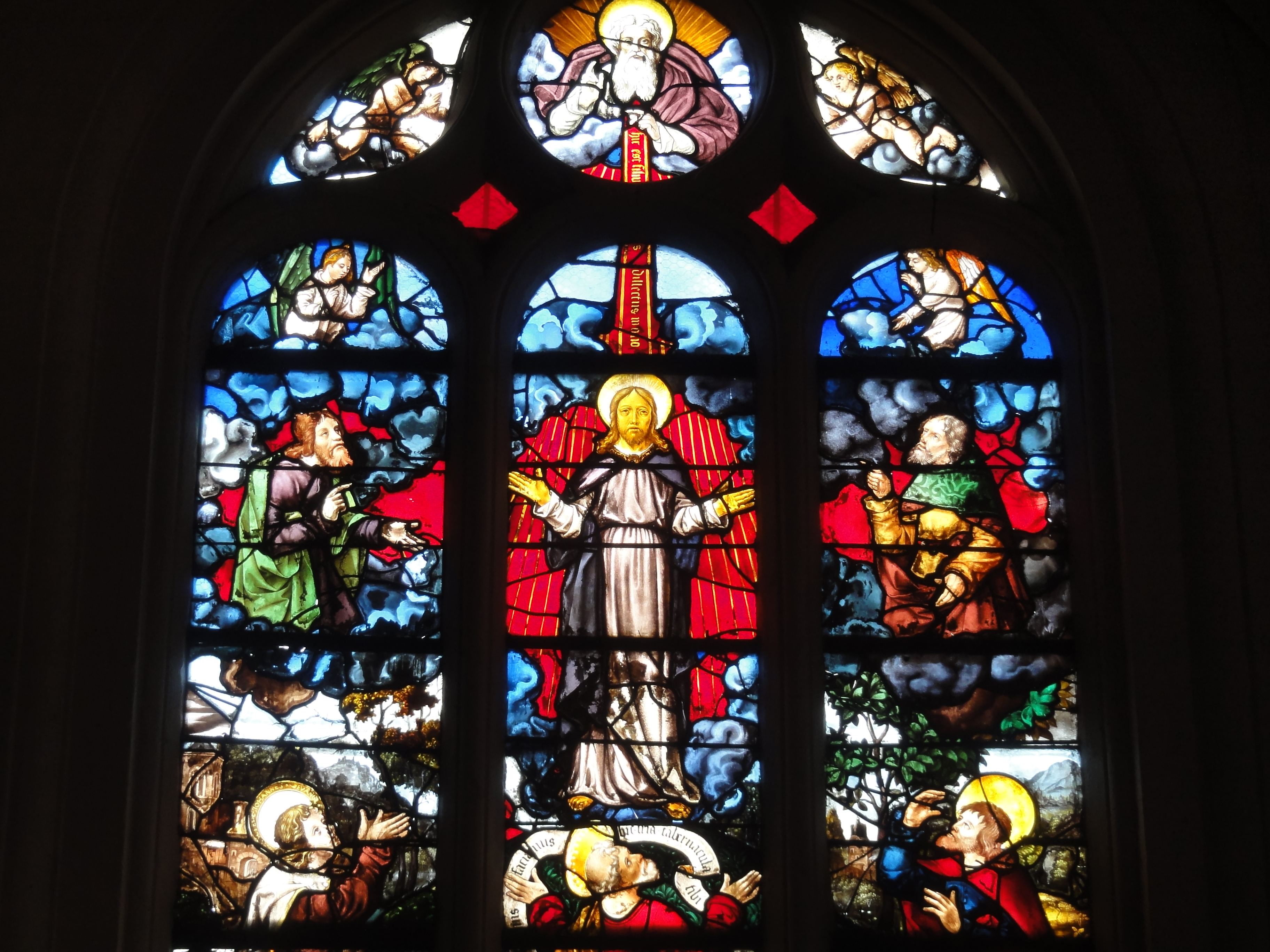 Verrière n° 4 dite de la Transfiguration du Christ.